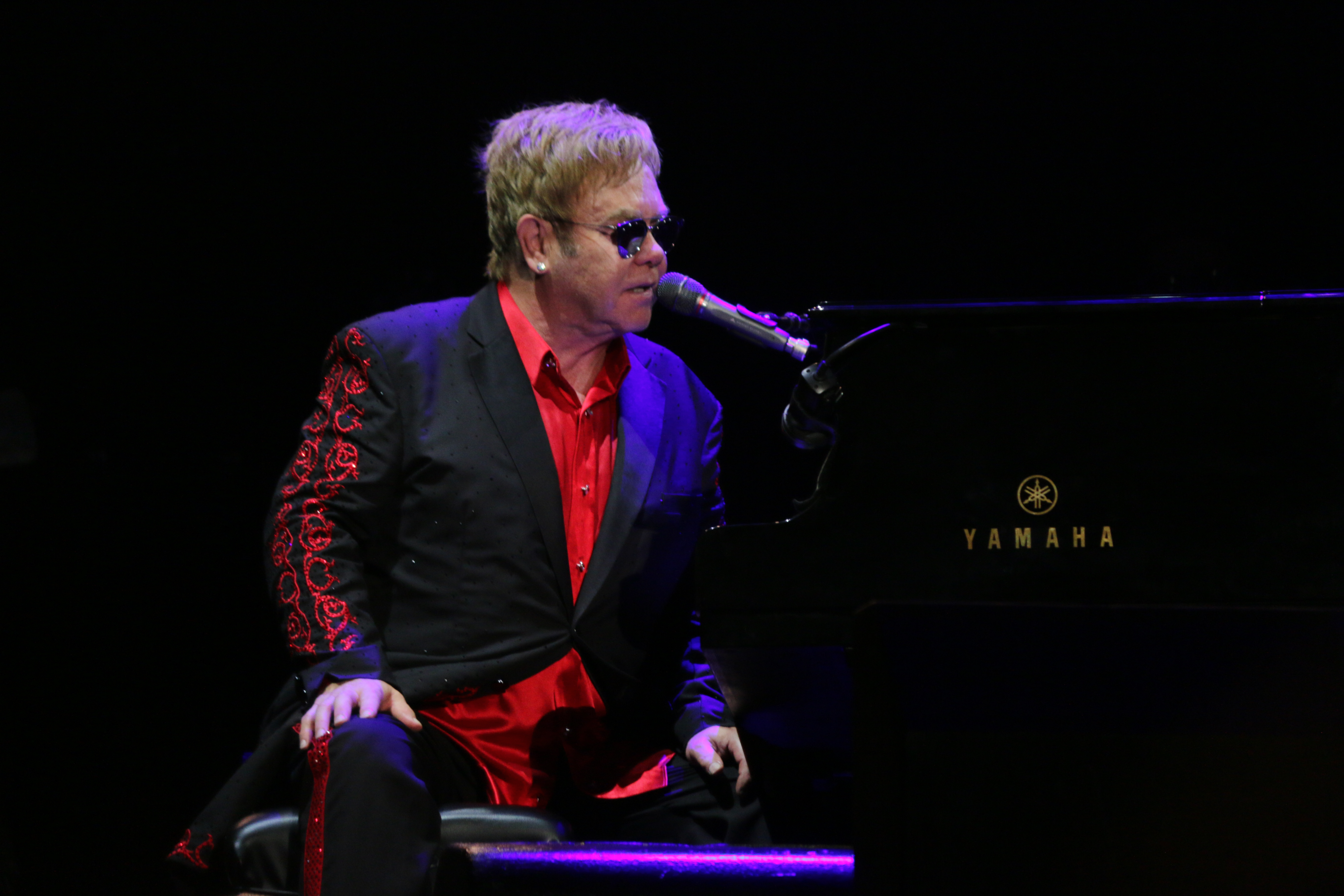 ELTON JOHN IN EXPO 2016 ANTALYA - 09.09.2016